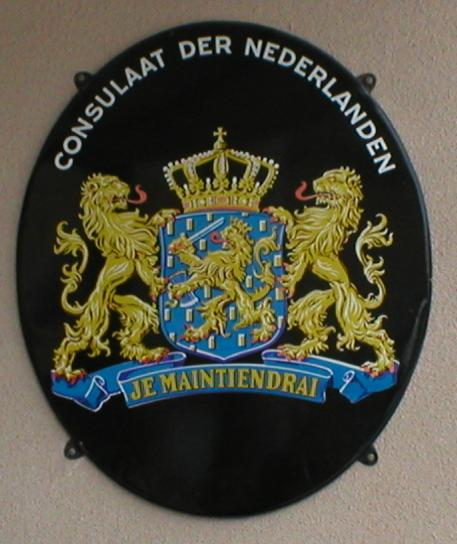 Foto av skylten vid Nederländernas konsulat i Mariehamn, taget av mig själv.